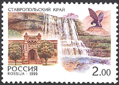 Ставропольский край.